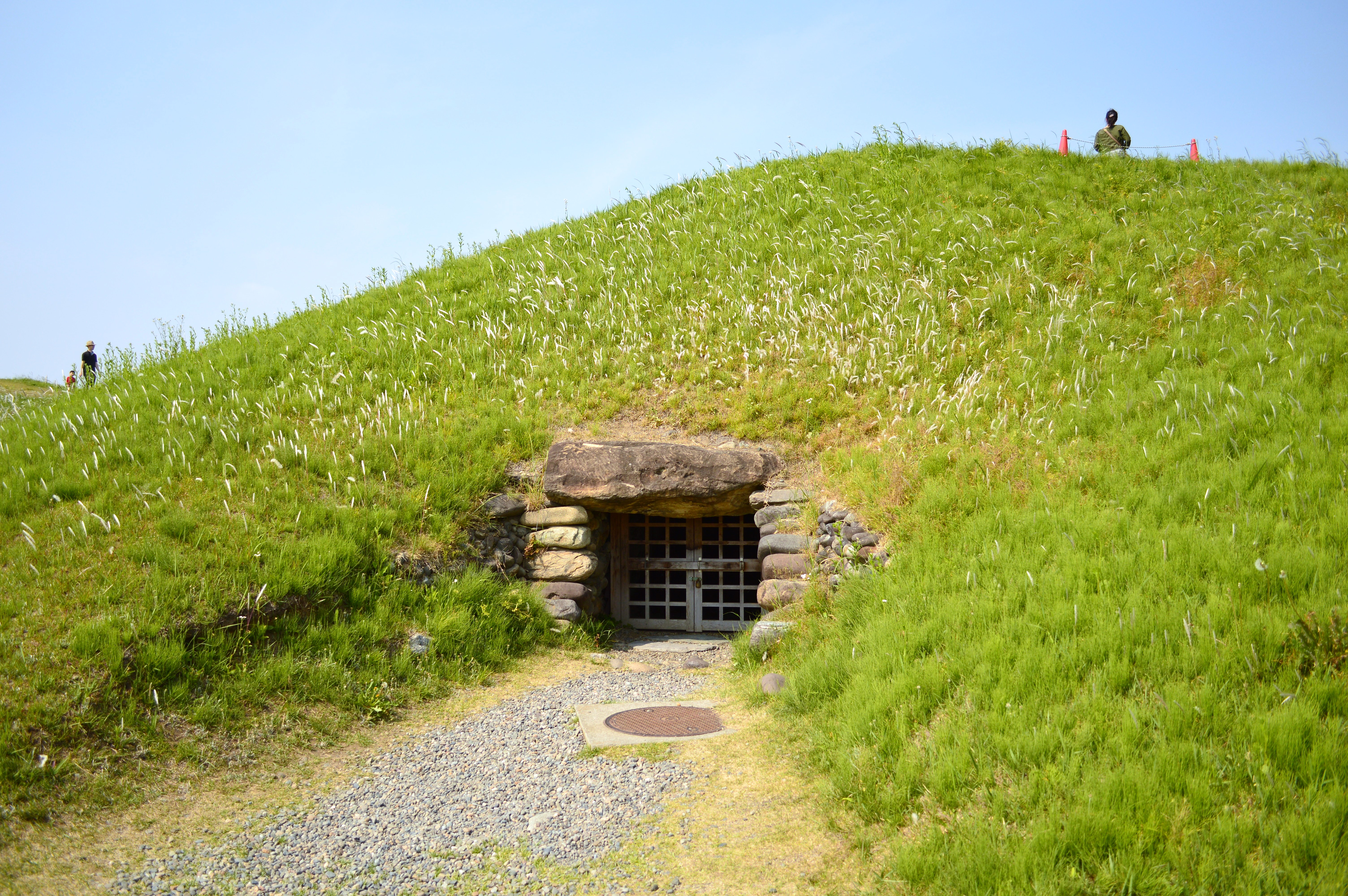 綿貫観音山古墳 石室入口